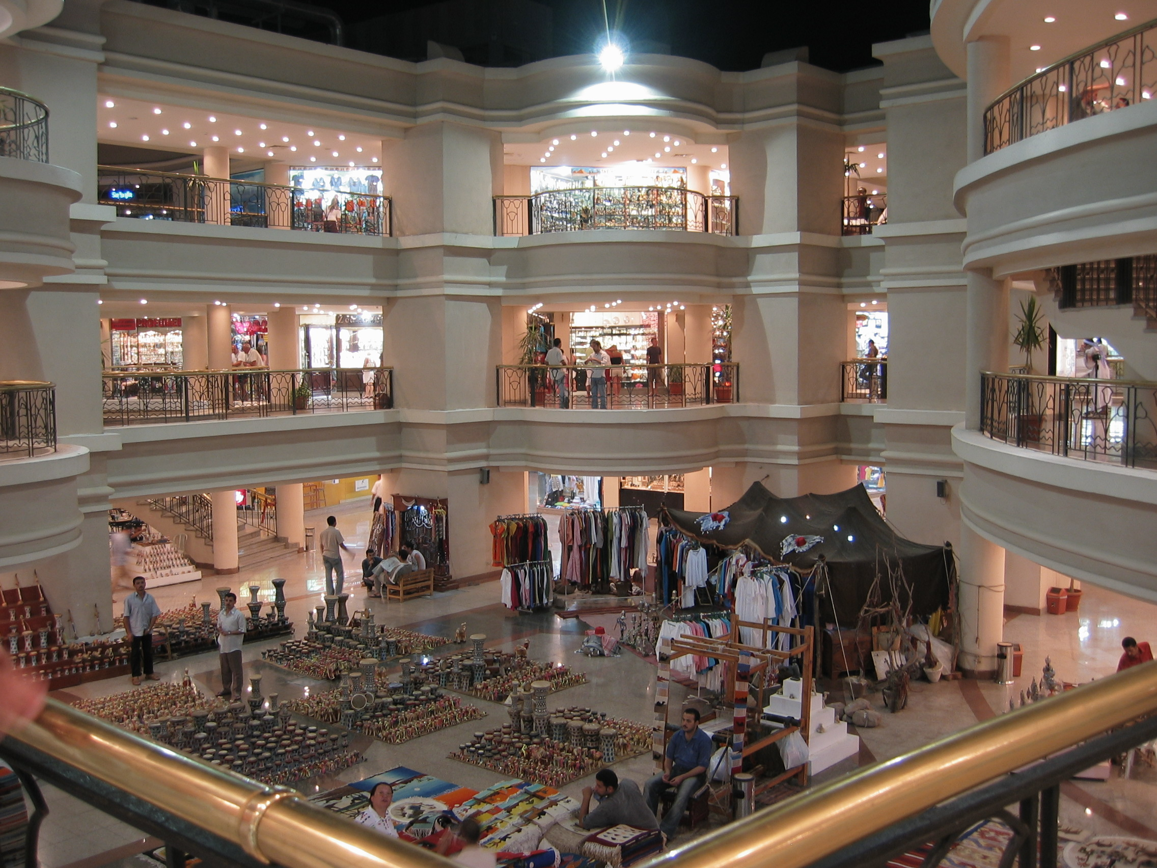 Centrum handlowe w dzielnicy Naama Bay w Sharm el Sheikh. Autor: Paweł Sikora